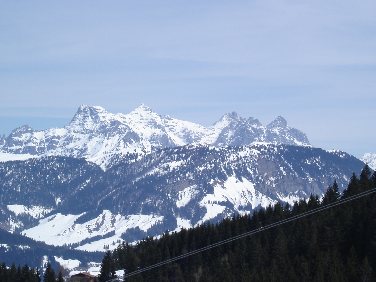 Loferer Steinberge from southwest